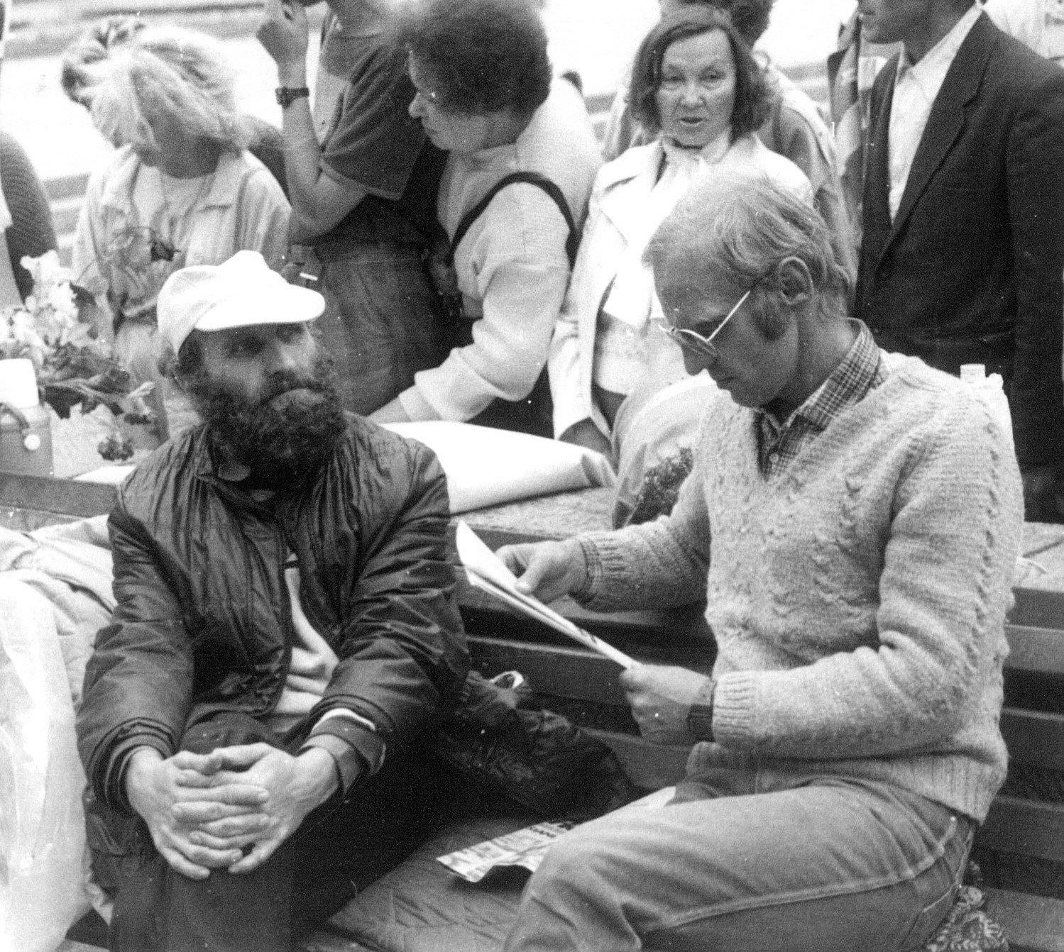 1988 metų vasarą Petras Cidzikas (kairėje) ir Algimantas Andreika pradėjo bado akciją, reikalaudami paleisti politinius kalinius ir išvesti iš Lietuvos okupacinę kariuomenę.